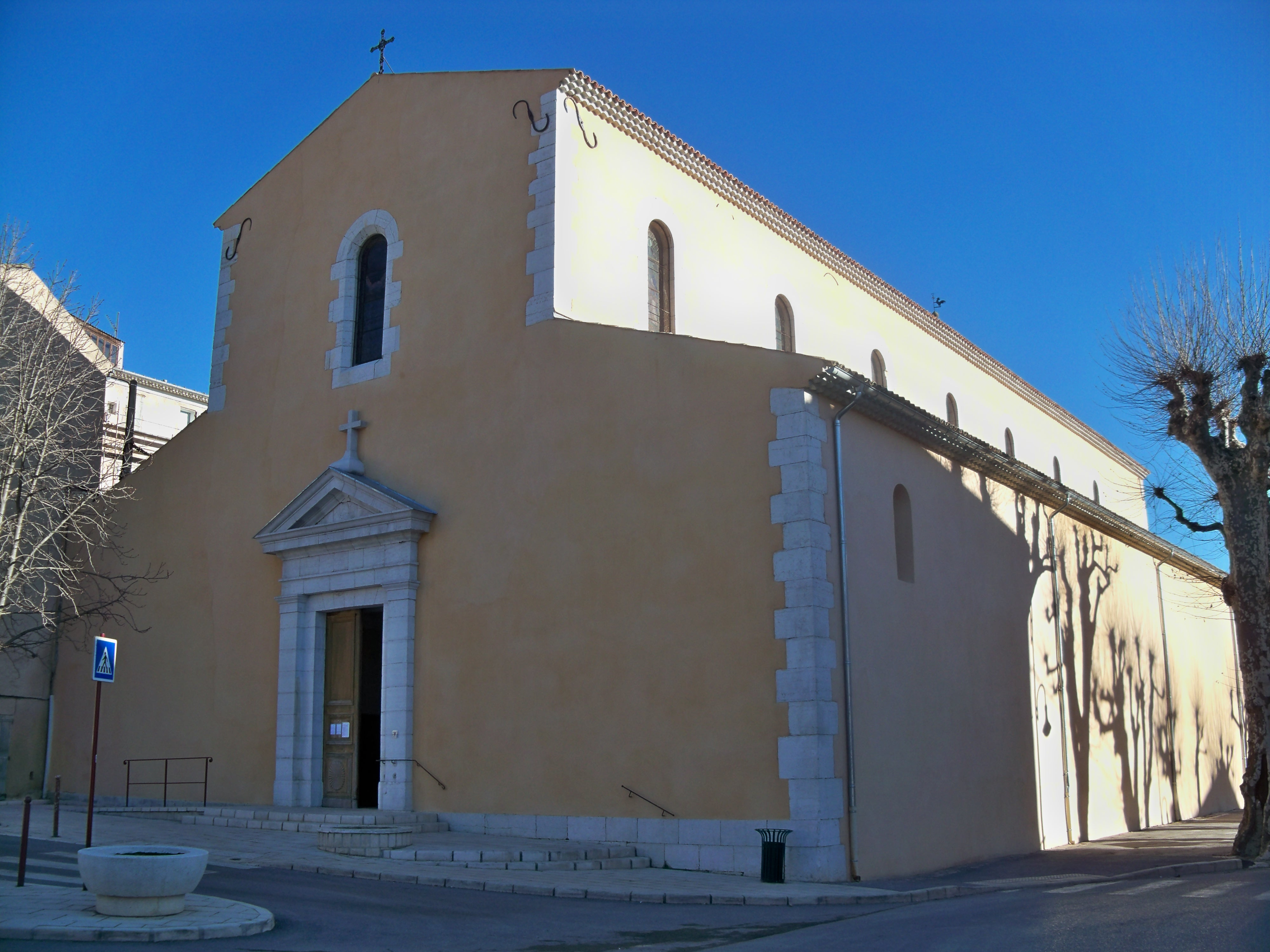 Notre Dame de l'Assomption de Riez, France